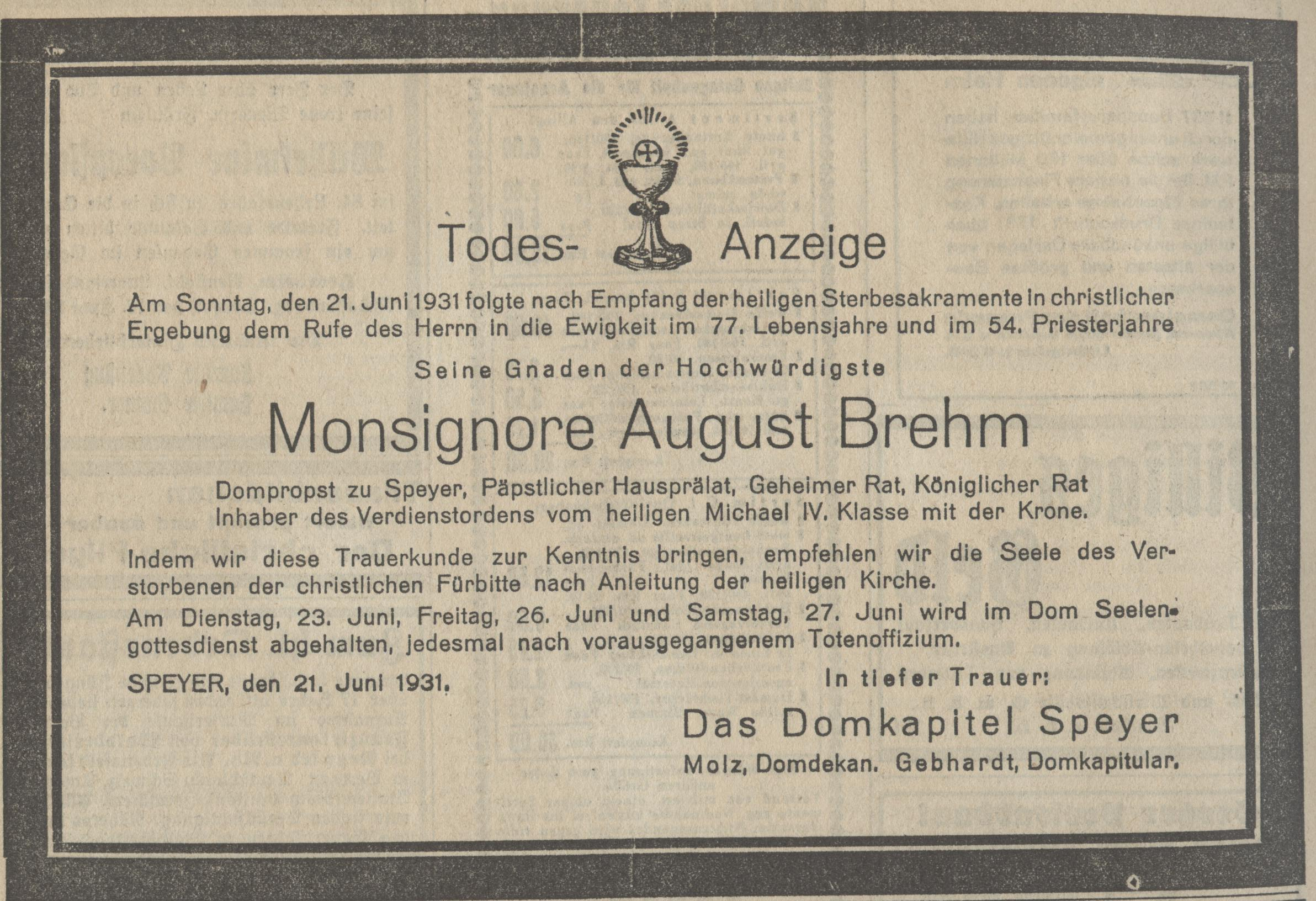 Msgr. August Brehm, Speyer, Todesanzeige